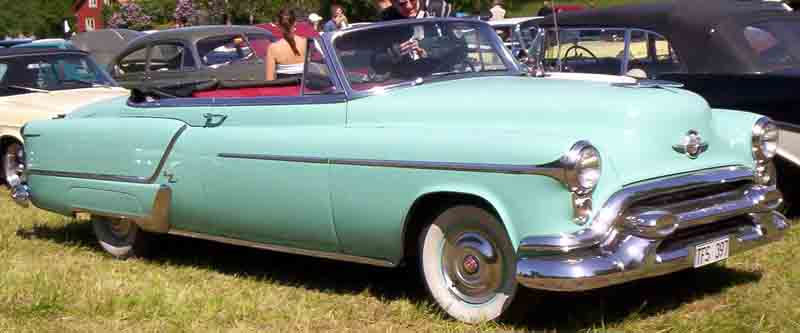 Oldsmobile 98 Convertible 1953